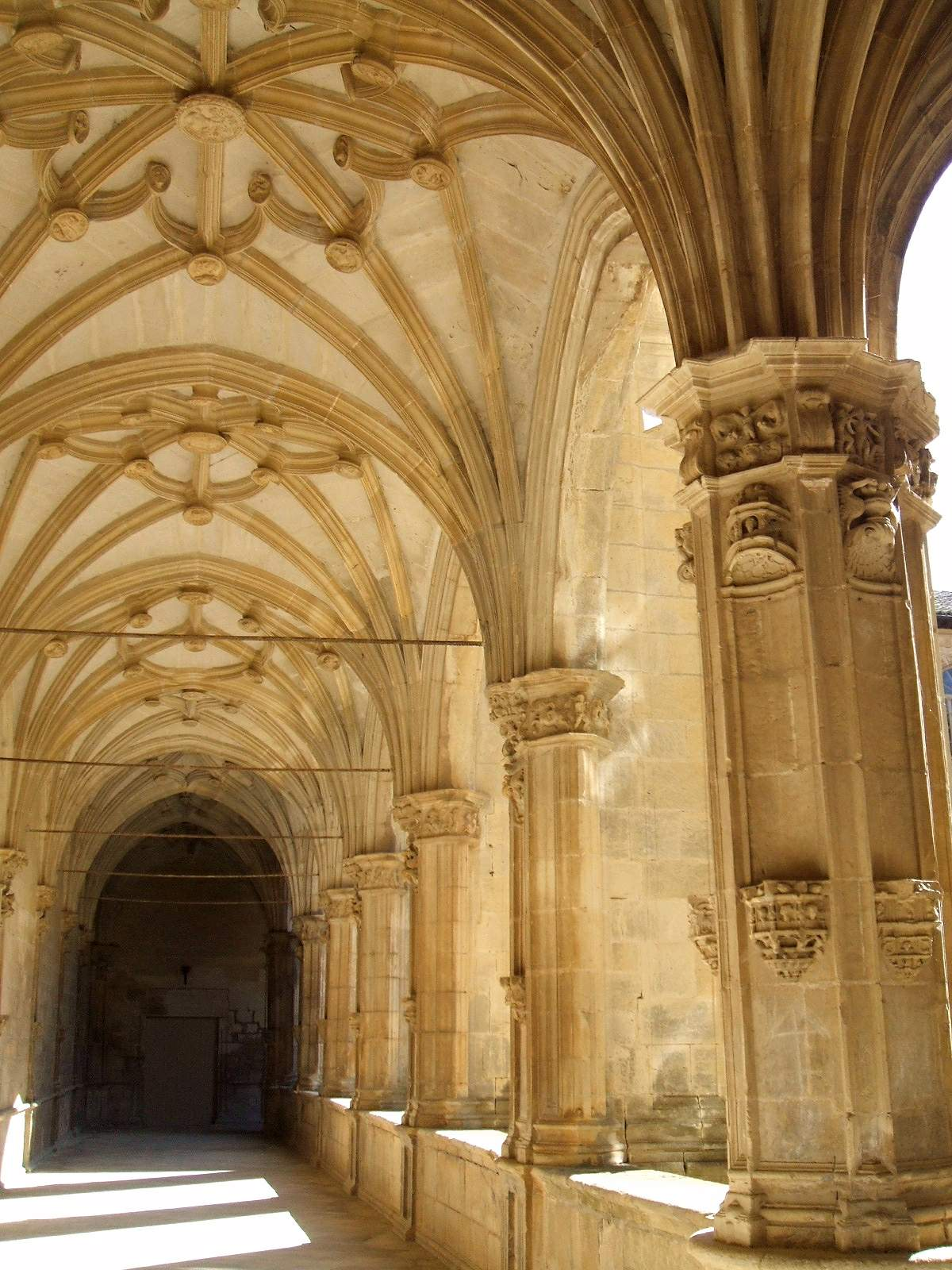 Claustro viejo, de estilo gótico-renacentista, del Monasterio de Irache (Ayegui, Navarra)